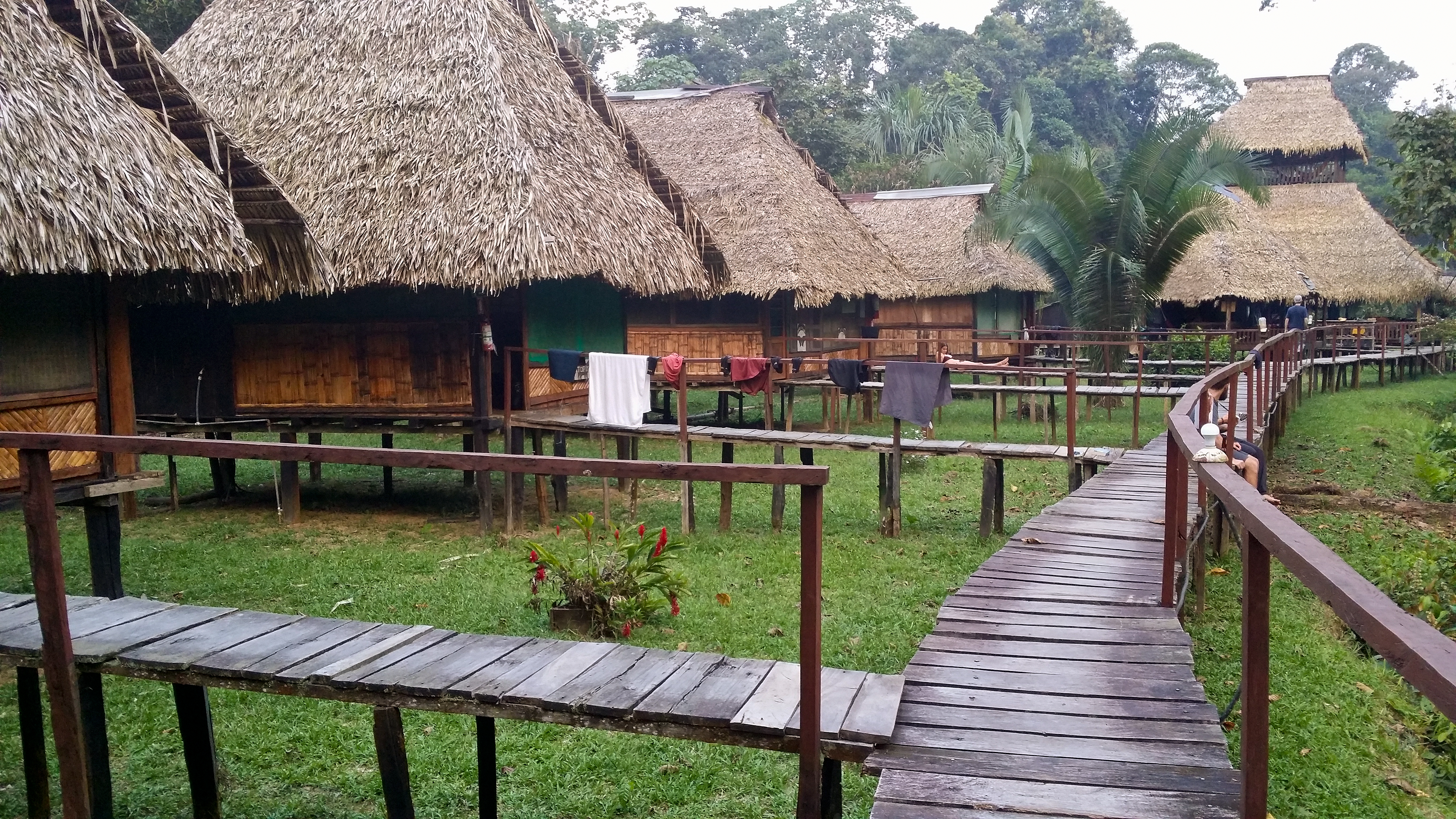 Cuyabeno River Lodge, westlich der Fernstraße E10, 20 Min. Motorbootfahrt vom Parkzentrum am Oberlauf des Río Cuyabeno